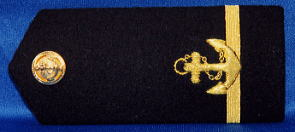 海自幹部候補生肩章